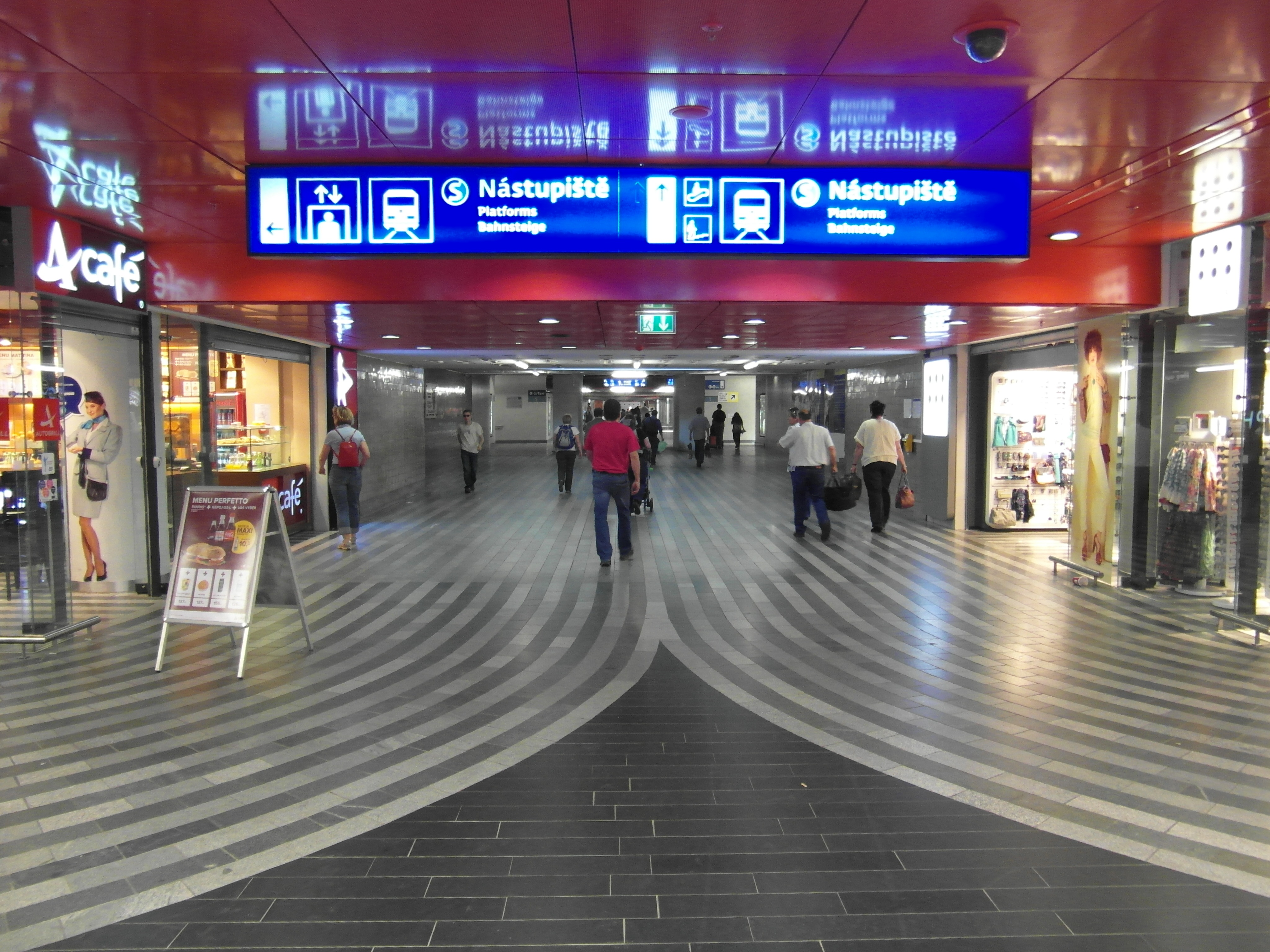 Praha - Hlavní Nádraží